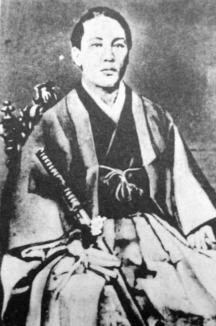 a Japanese man 榎本武揚 (Takeaki Enomoto)